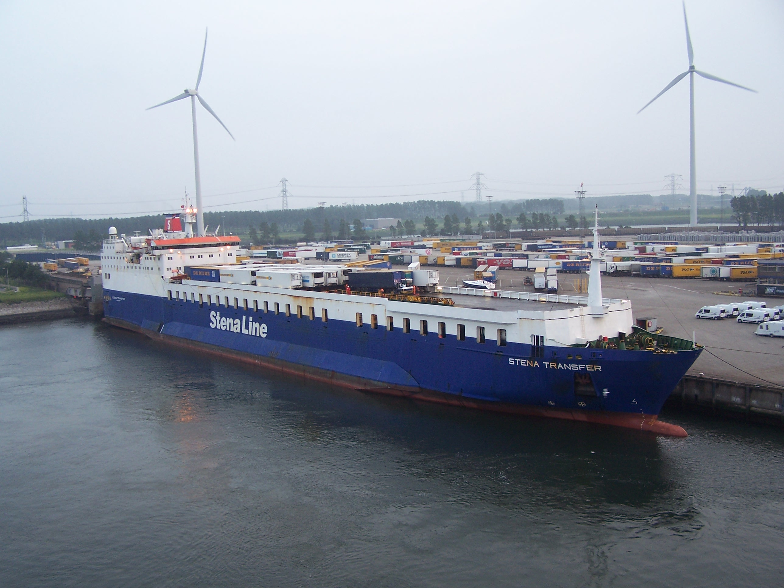 Europoort Rotterdam 12/06/07